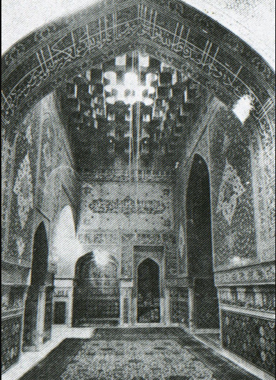 مسجدبالاسر حرم امام رضا